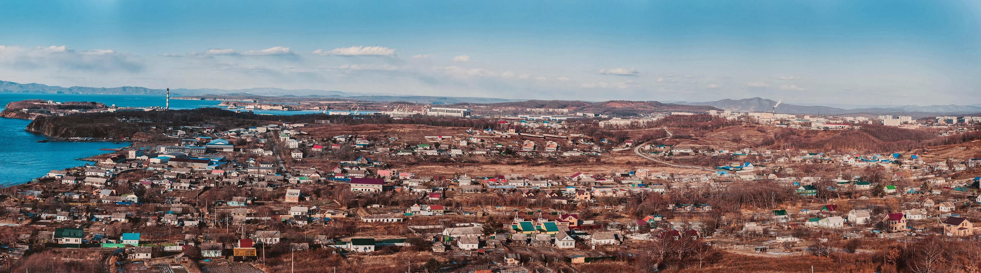 Панорама посёлка Андреева с телефонной вышки (микрорайон Большого Камня, Приморский край)